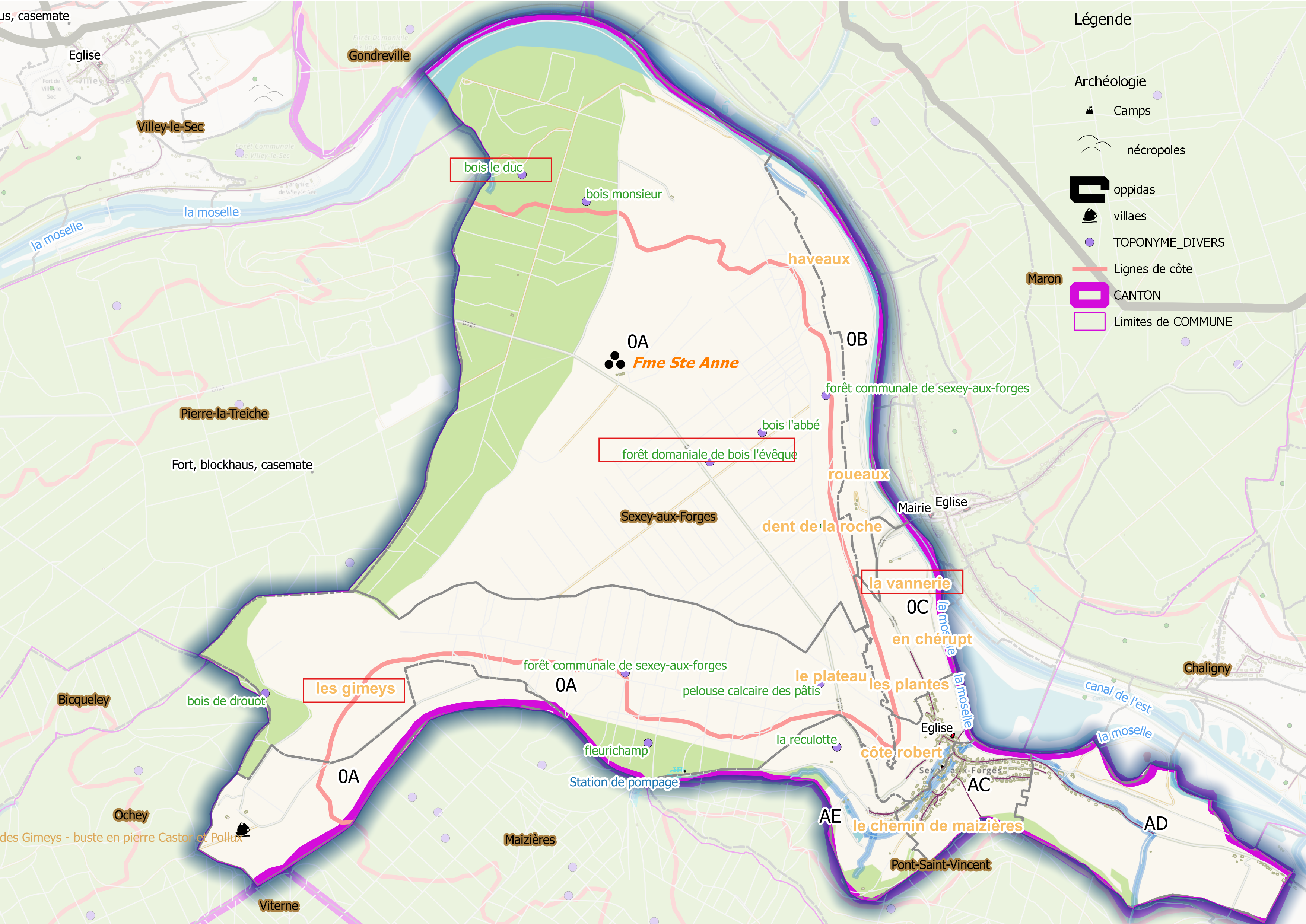 Sexey aux forges (ban communal) - OSM et Qgis, mentions additionnelles